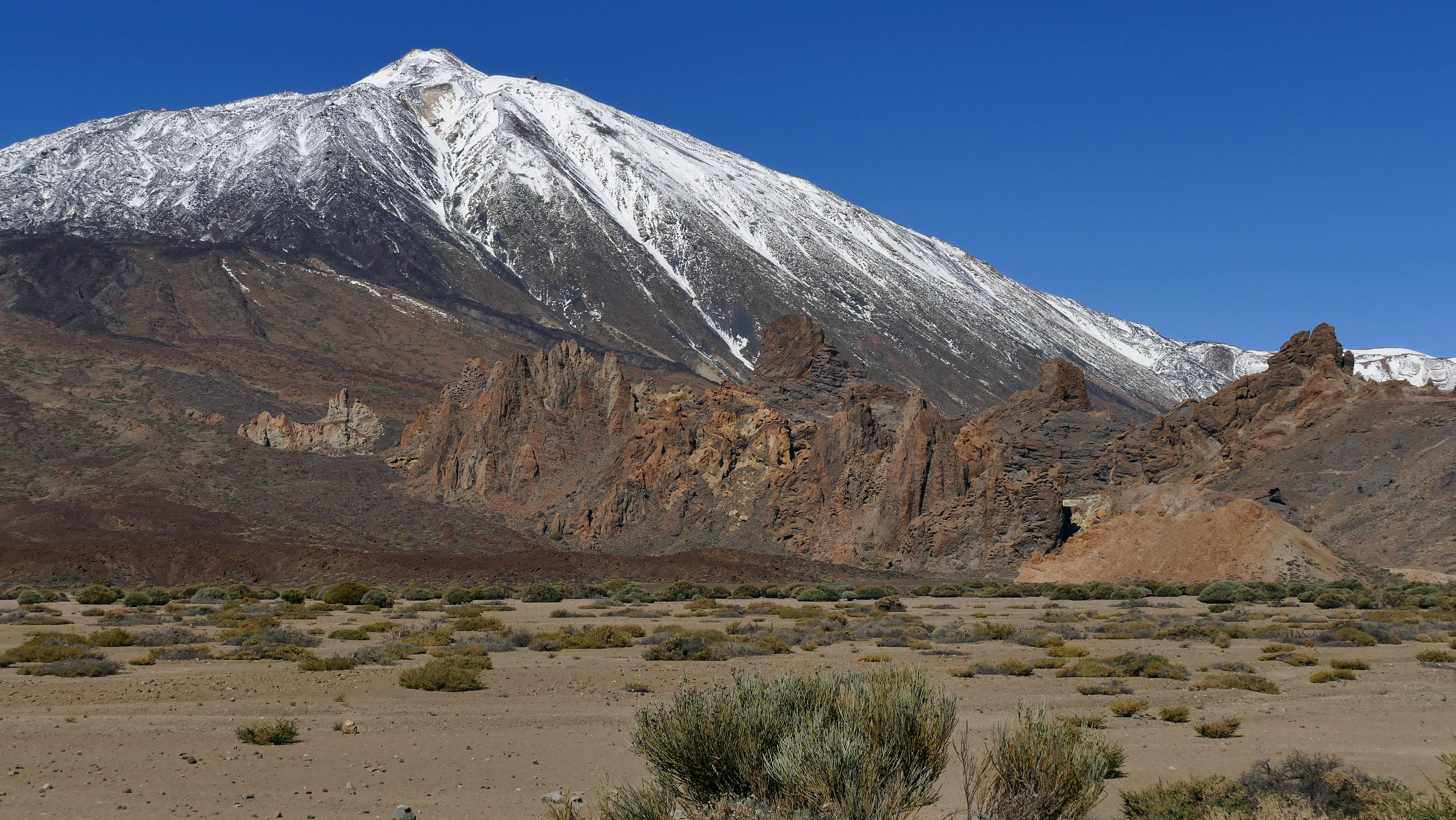 El llano de Ucanca en el Parque Nacional del Teide es una cuenca endorreica que deposita material sedimentario muy fino (de origen volcánico) en un valle que termina erosionado de un modo curioso. En el fondo se puede ver los Roques de García y el Teide.